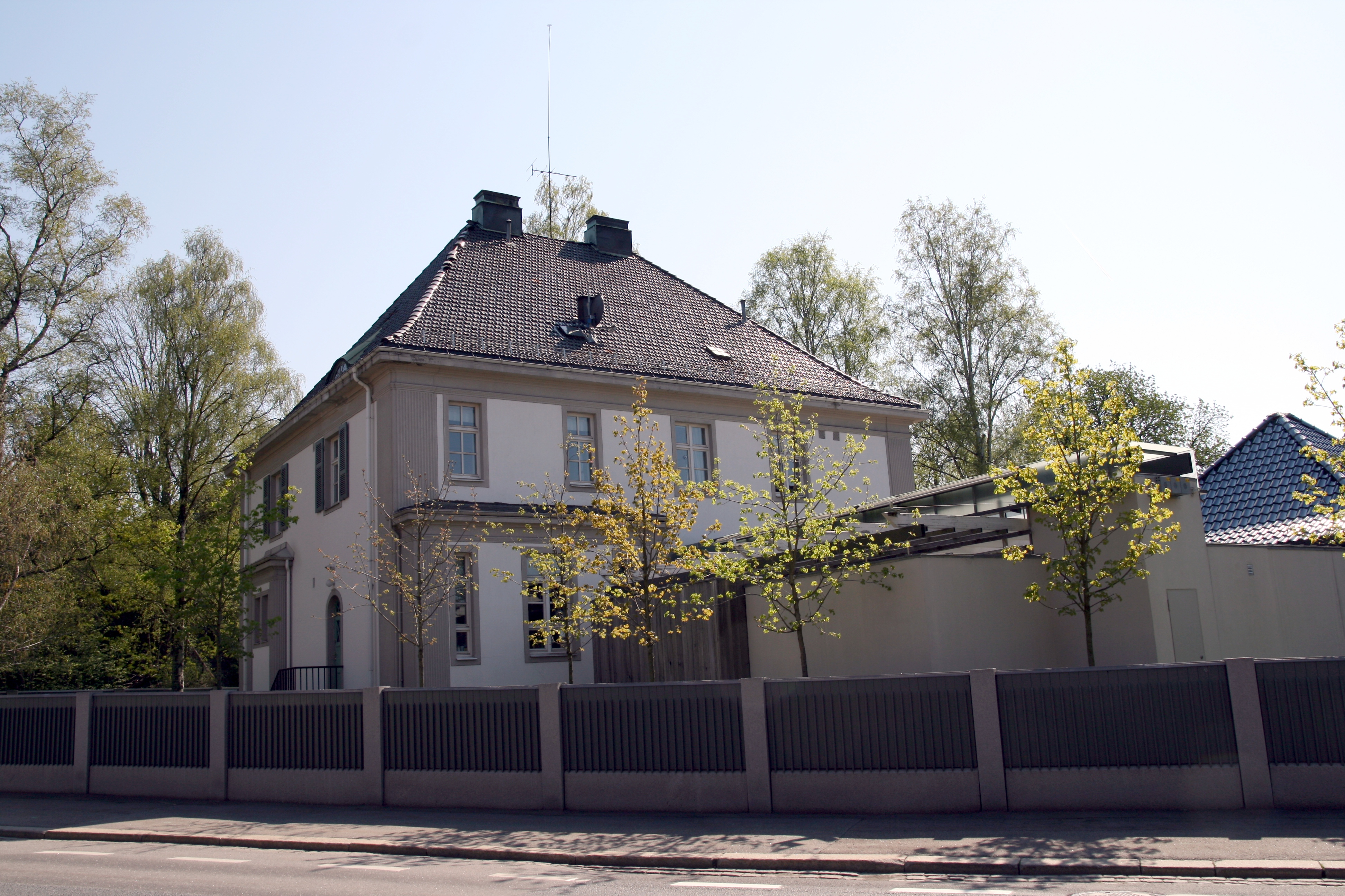 Ottar Birtings gate 2 i Oslo.